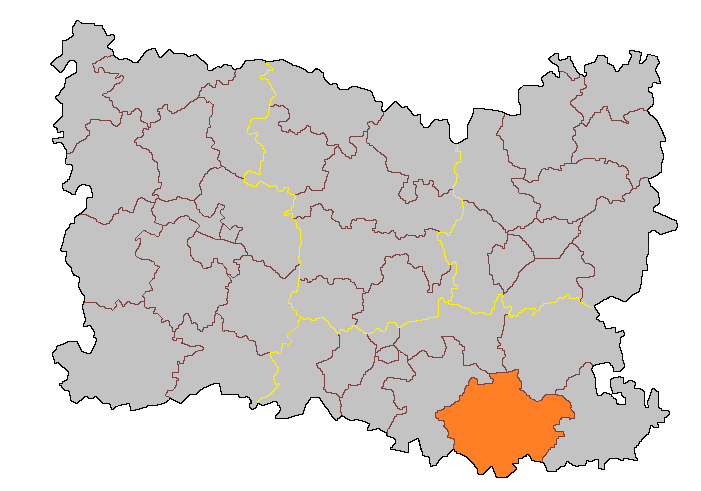 Кантон Нантёй-ле-Одуэн на карте департамента Уаза